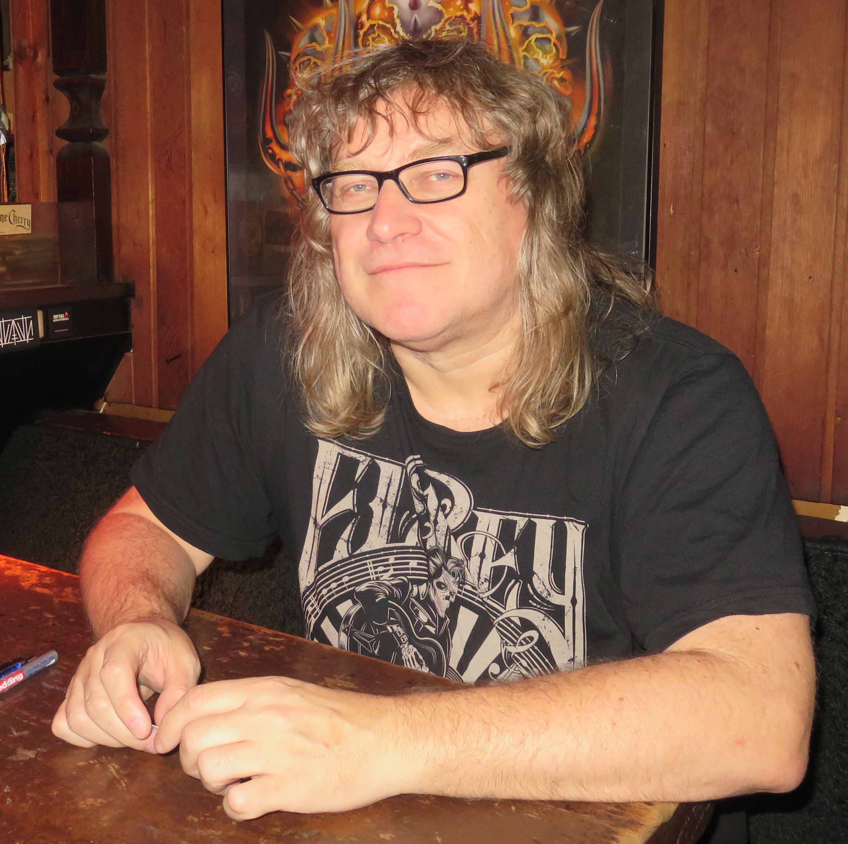 Jugendkulturforscher Klaus Farin nach einem Vortrag über das Thema Böhse Onkelz in der Frankfurter Hard'n'Heavy-Kneipe Speak Easy (Große Rittergasse 42)